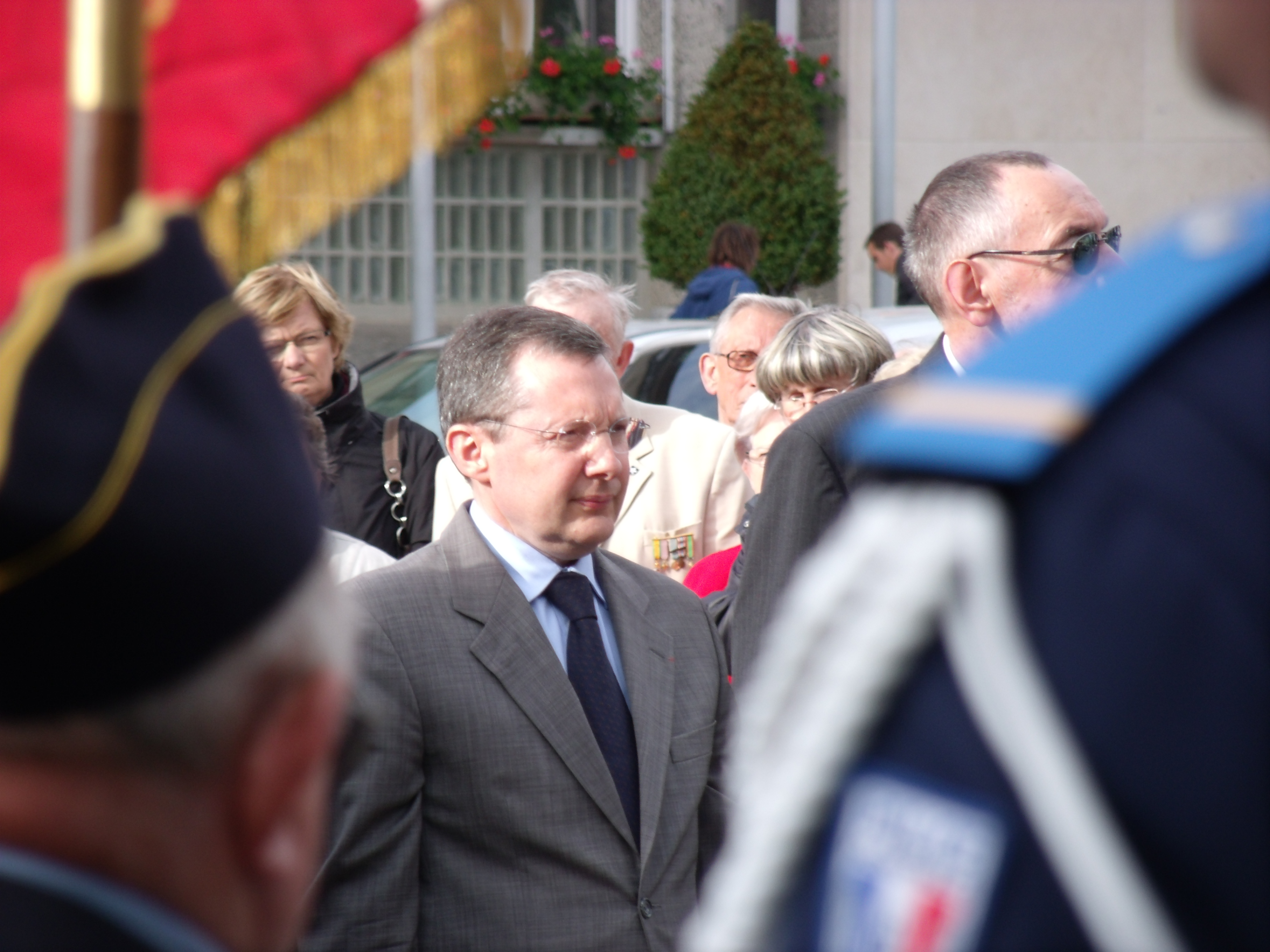 Philippe BAS aux cérémonies du 6 juin 2012 à Saint-Lô